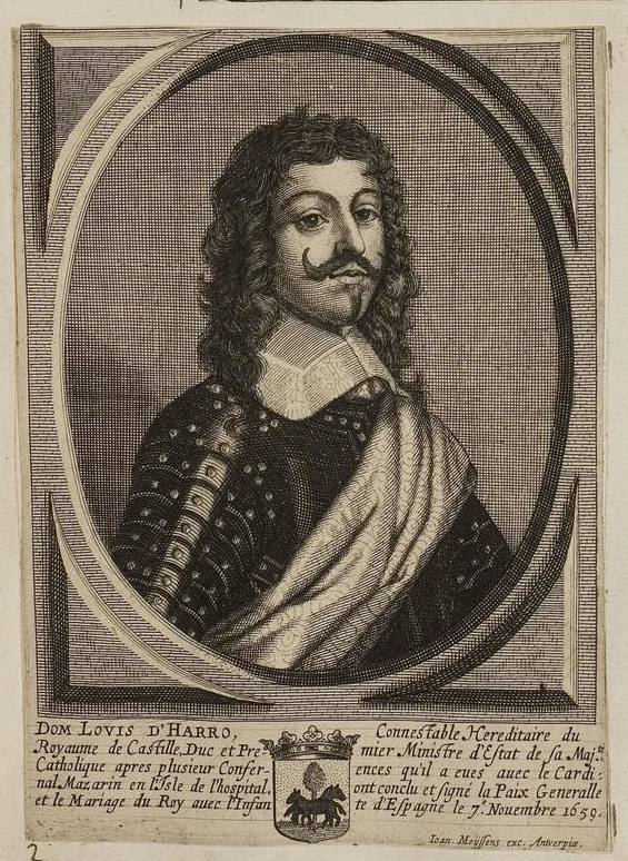 Grafik aus dem Klebeband Nr. 1 der Fürstlich Waldeckschen Hofbibliothek Arolsen Motiv: Luis Méndez de Haro (1598–1661), Span. Diplomat und Kunstsammler